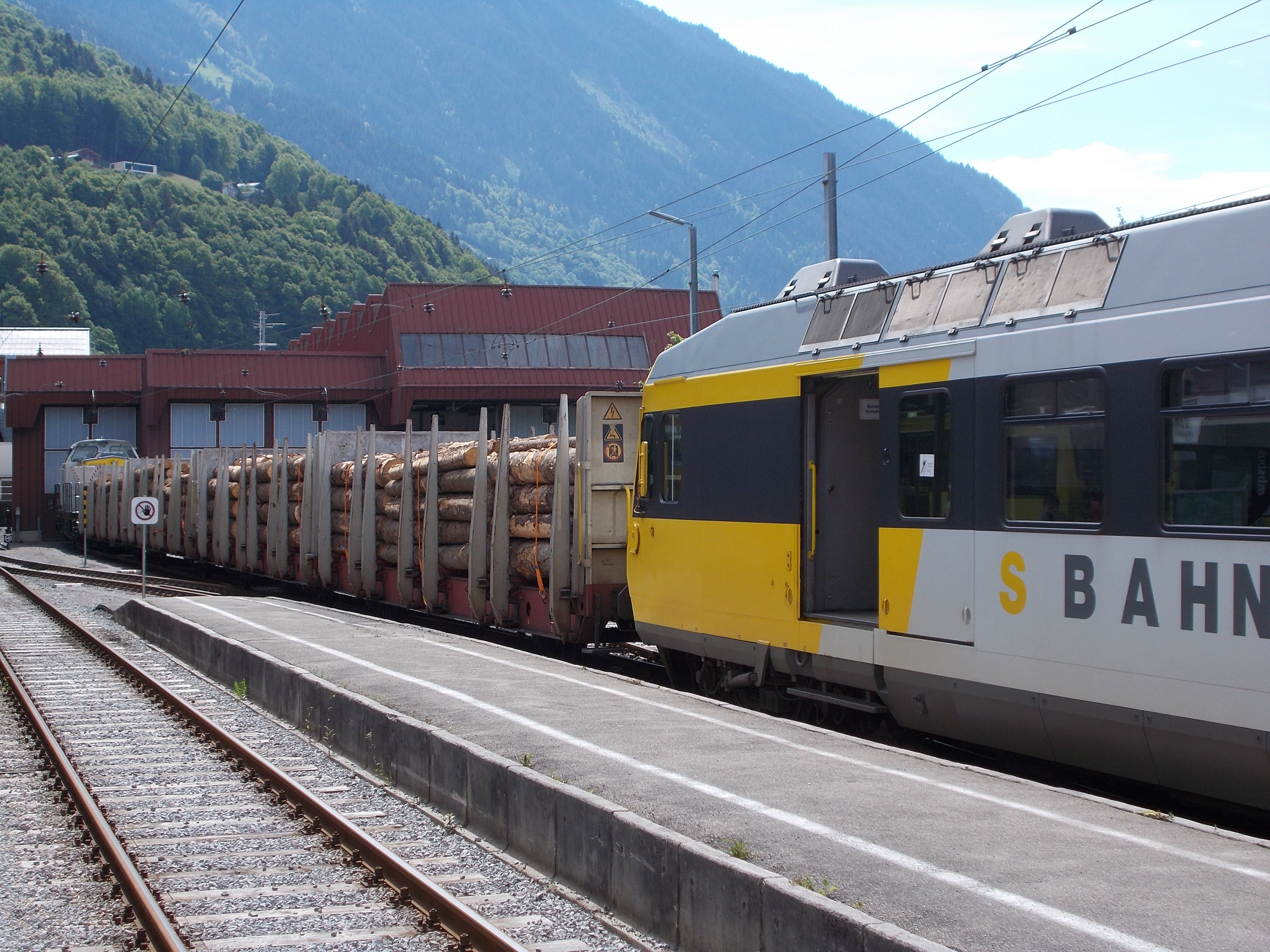 Ein im fahrplanmäßigem Personenverkehr verkehrender MBS-Triebwagen mit angehängten Holztransportwagen steht im Bahnhof Schruns zur Abfahrt nach Bludenz bereit. (2015)